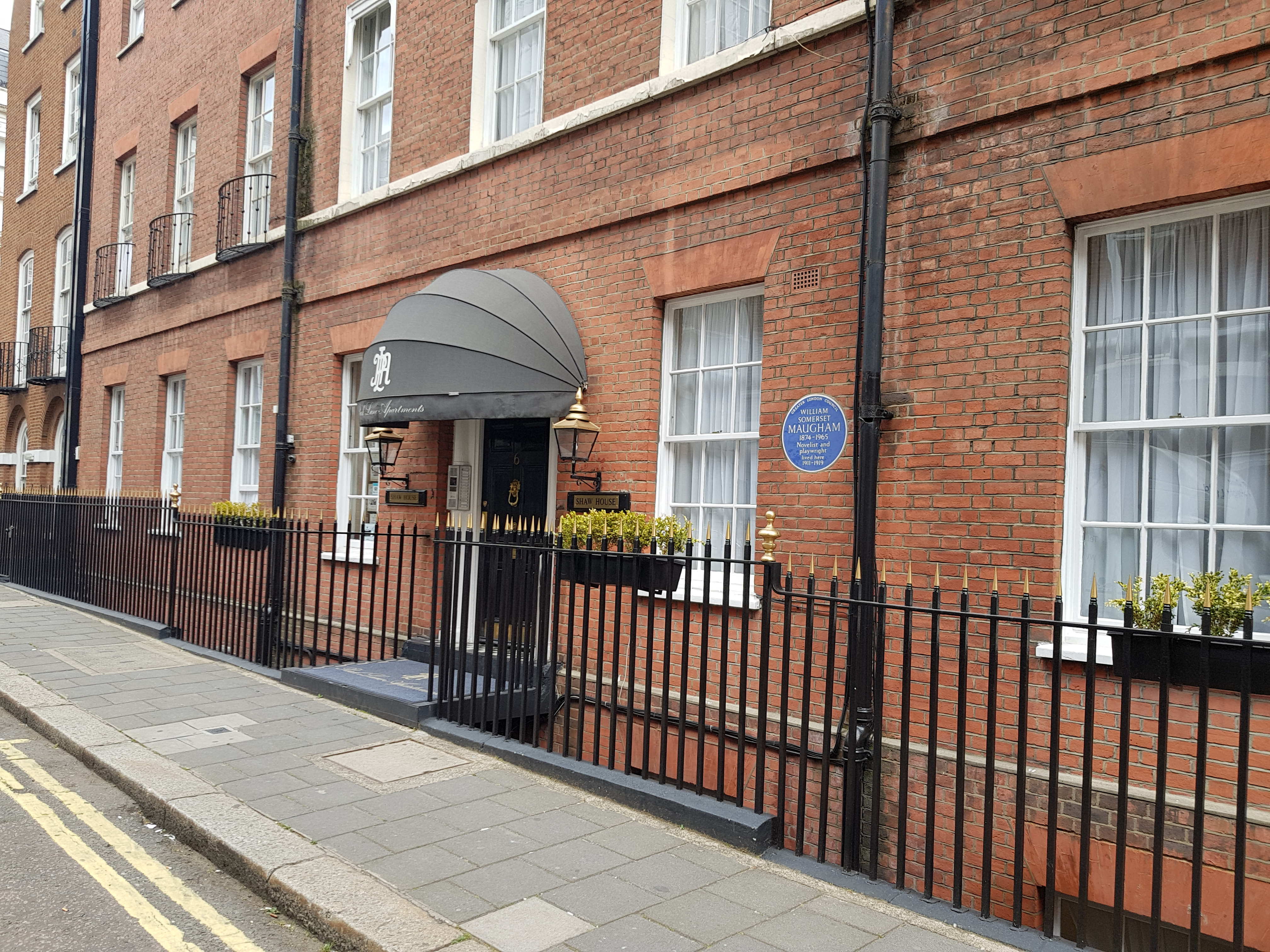 6, Chesterfield Street, Londres.